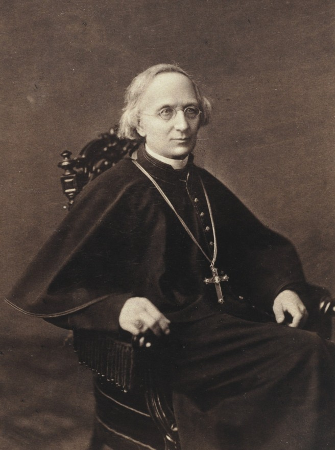 Albin Dunajewski, Polish cardinal